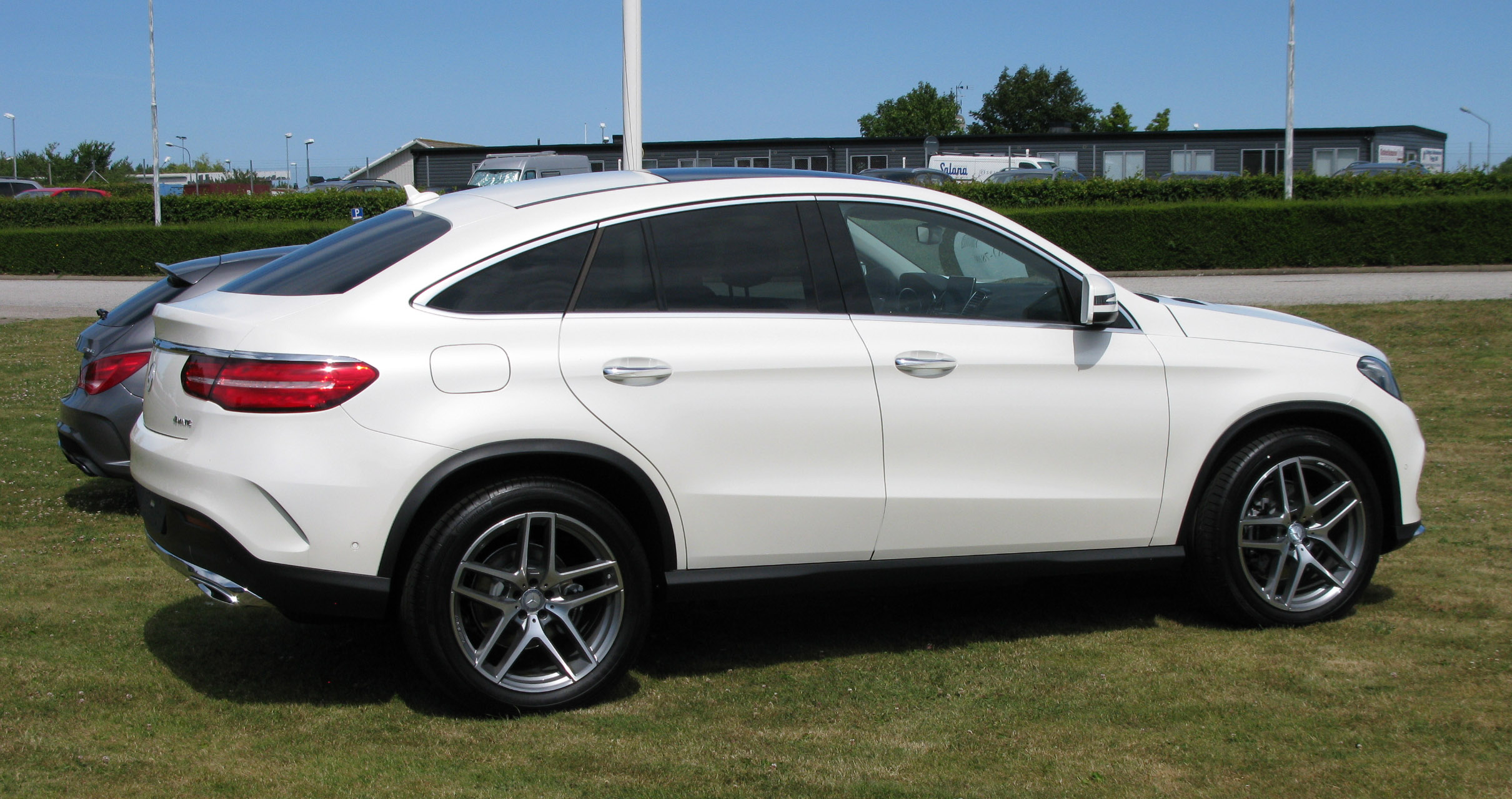 Mercedes-Benz GLE350d Coupé